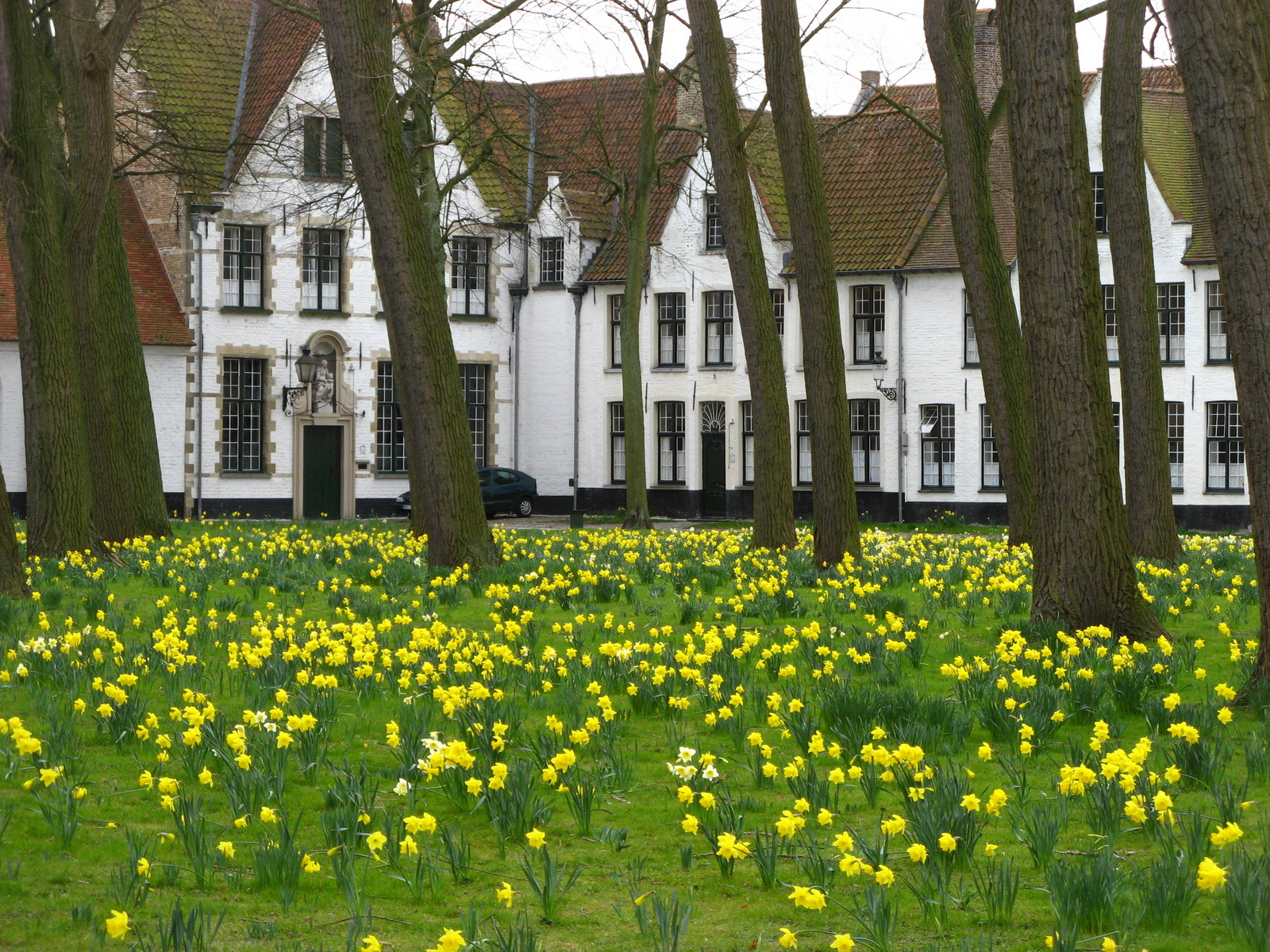 Begijnhof Brugge